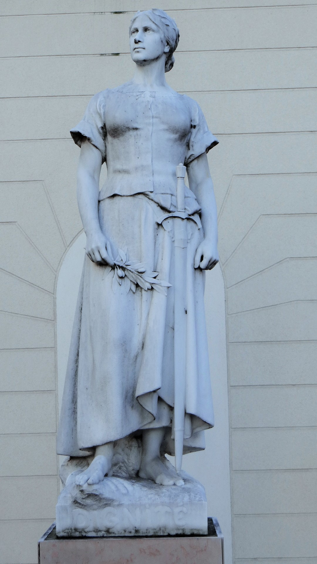 Statue "Dignité" réalisée en 1906 par Charles Théodore Perron (statue située à l'angle des avenues de la République et de Verdun à Montrouge)